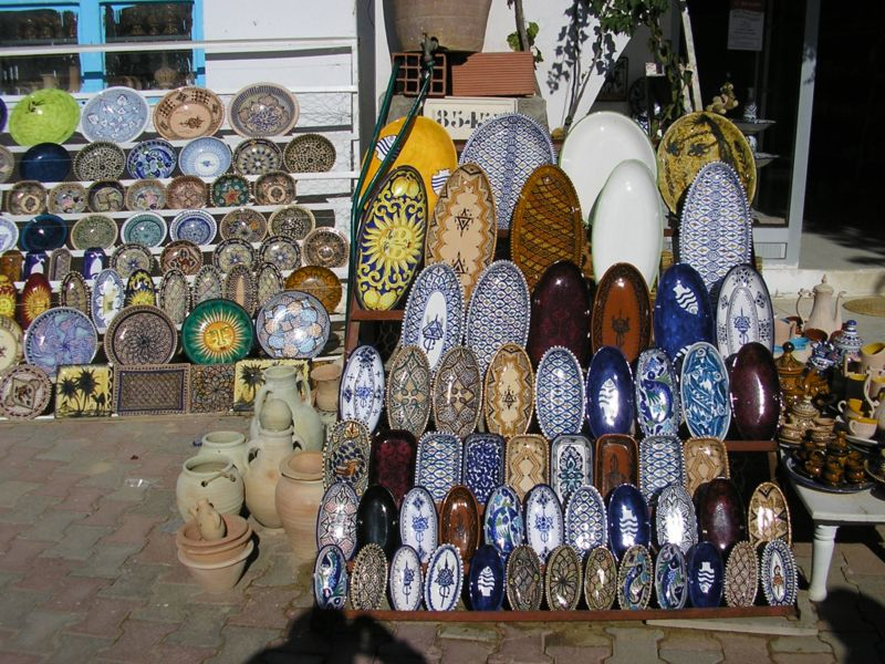 Photographie personnelle prise en décembre 2004 représentant l'étal d'un potier à Guellala.